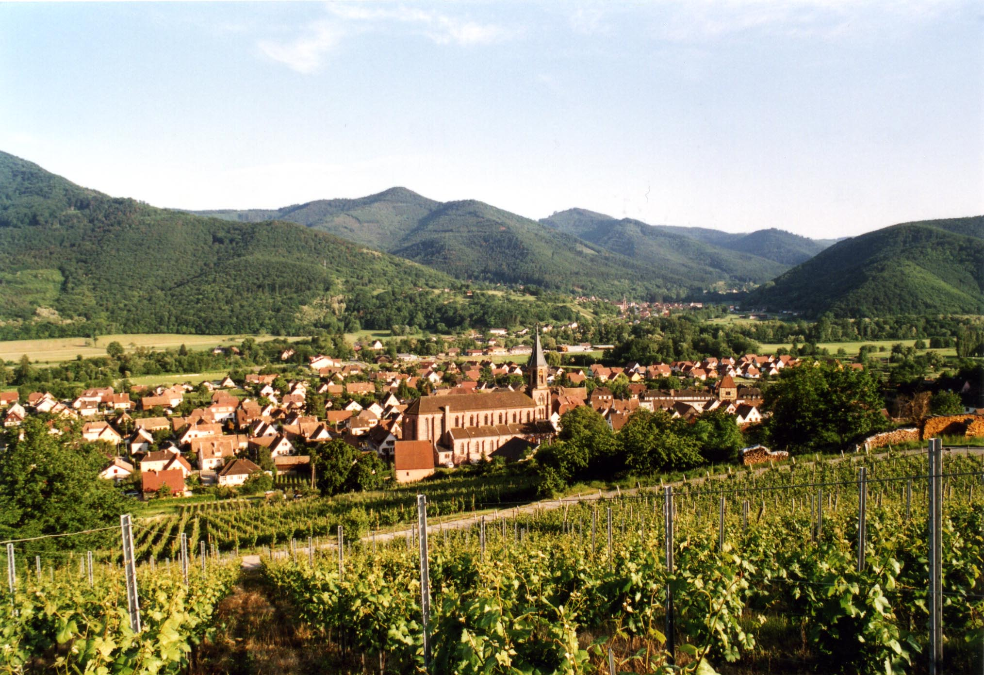 Wihr-au-Val Photo : Samuel Wernain